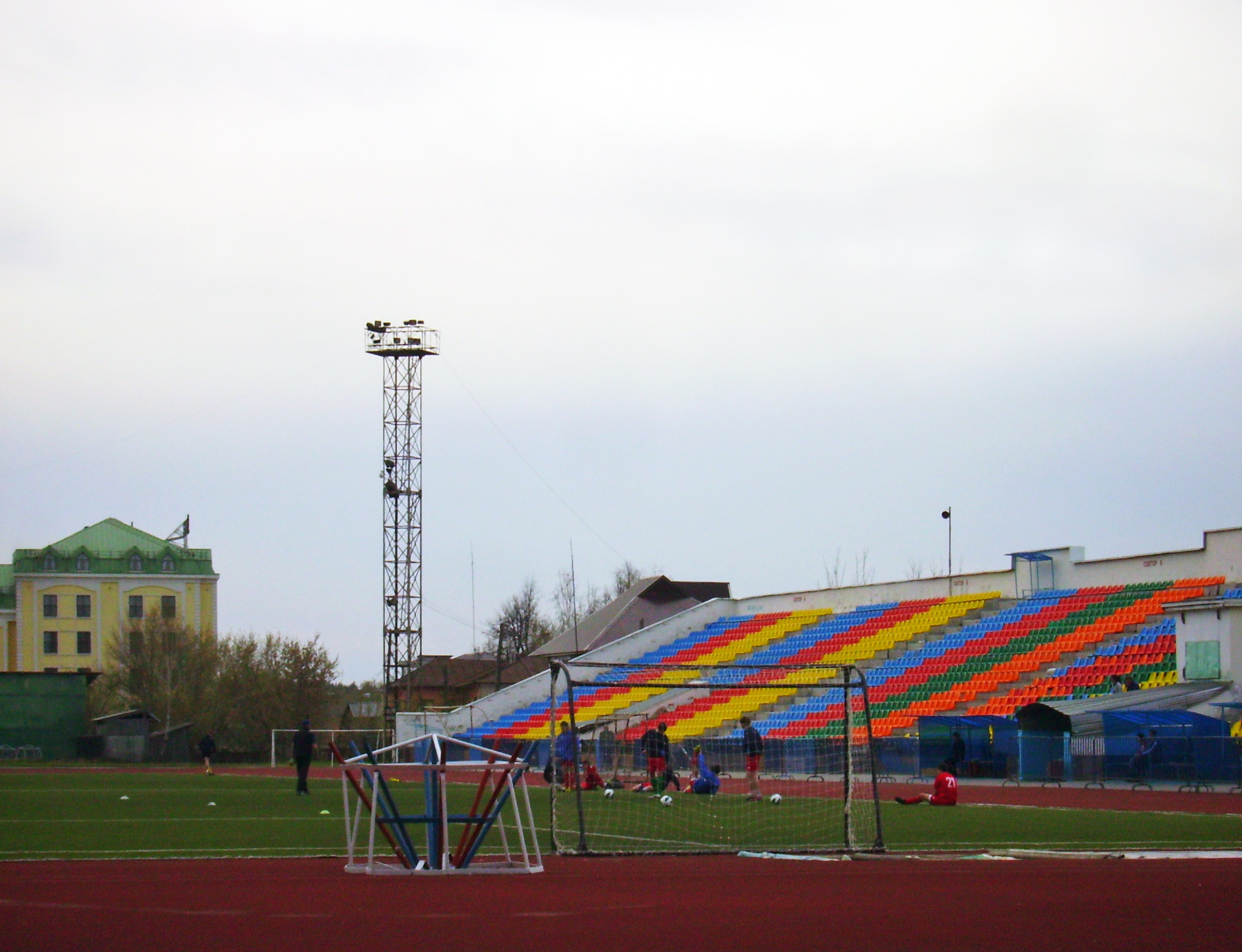 Выкса. Футбольная тренировка на стадионе "Металлург"